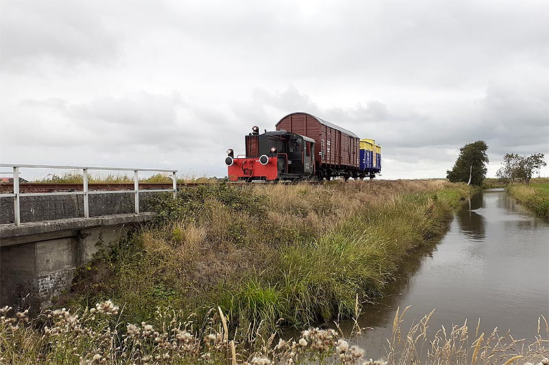 Köf 6152 "Helga" vor kurzem Güterzug